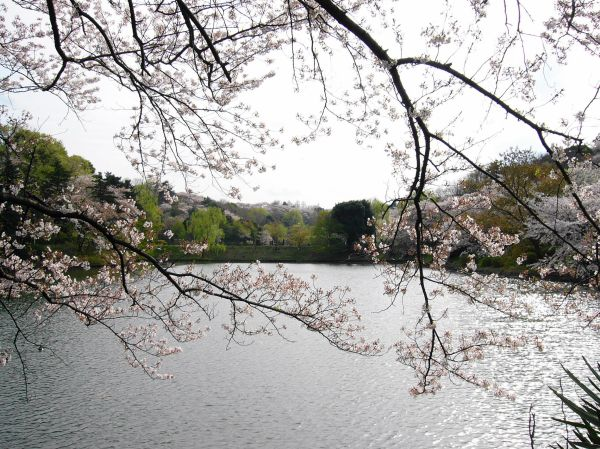 三ッ池公園。神奈川県横浜市鶴見区。2007年4月6日、投稿者が撮影。